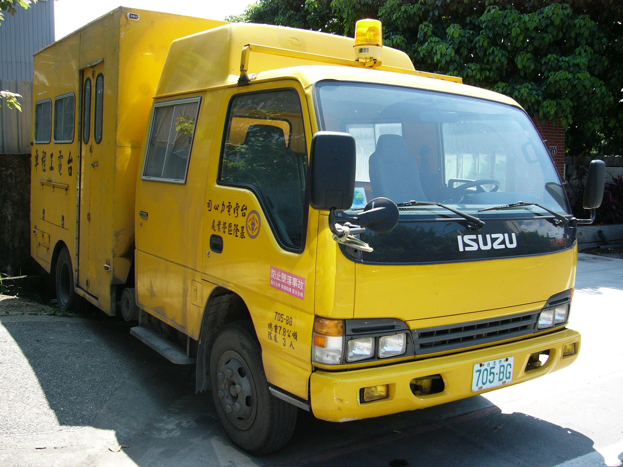 基隆市七堵區工建路，台灣電力公司基隆區營業處五十鈴一路發工程車705-BG。